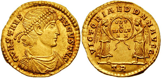 Soldo do imperador romano Constante emitido em 345 em Augusta dos Tréveros (atual Tréveris)